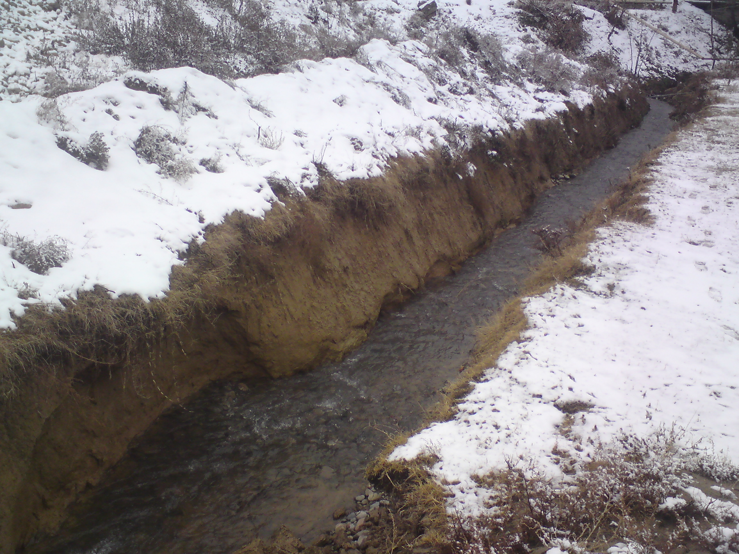 Канал (арык) Чукаркуприк в районе улицы Самарканд-Дарбаза, город Ташкент